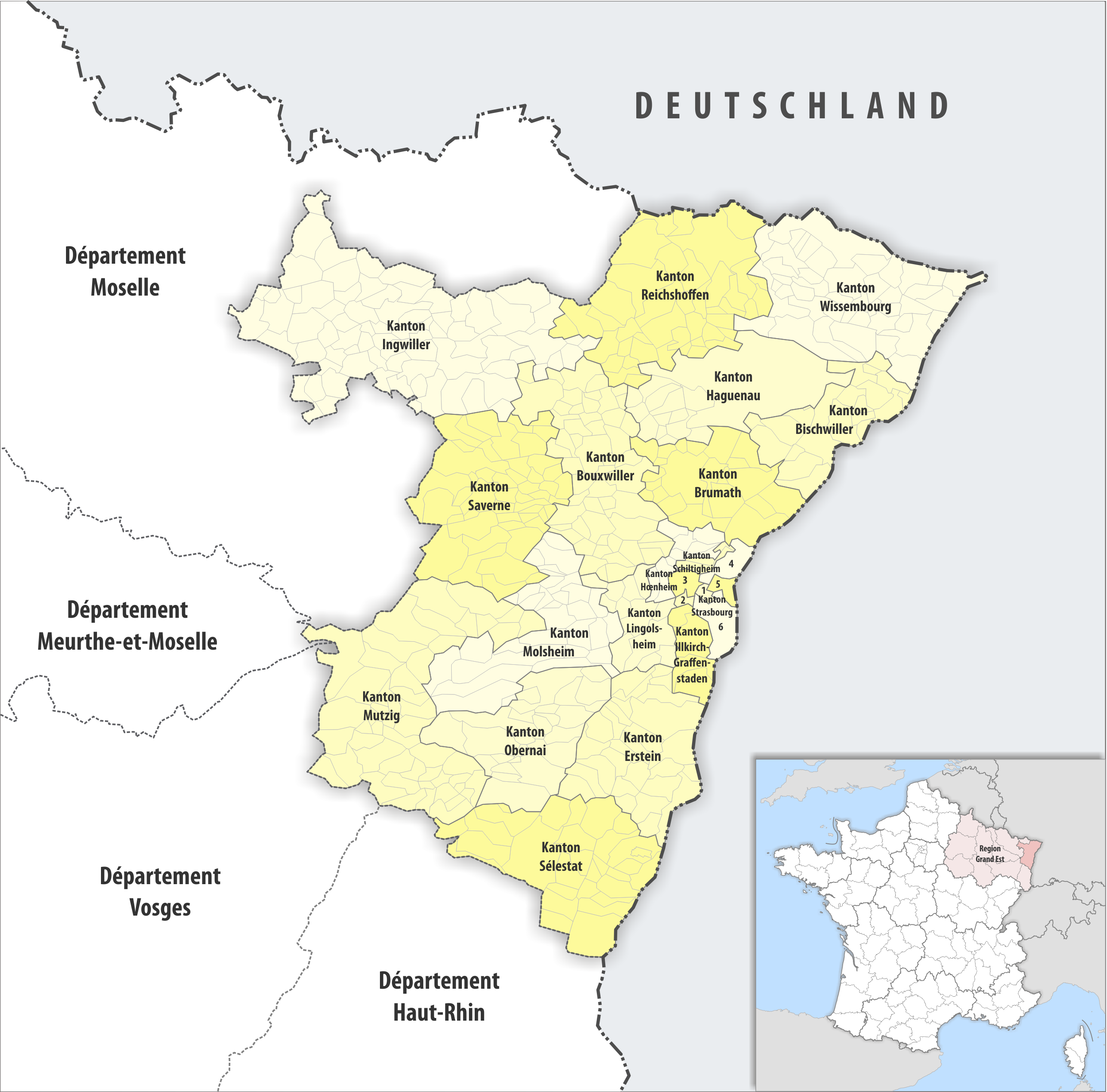 Gemeinden und Kantone im Departement Bas-Rhin